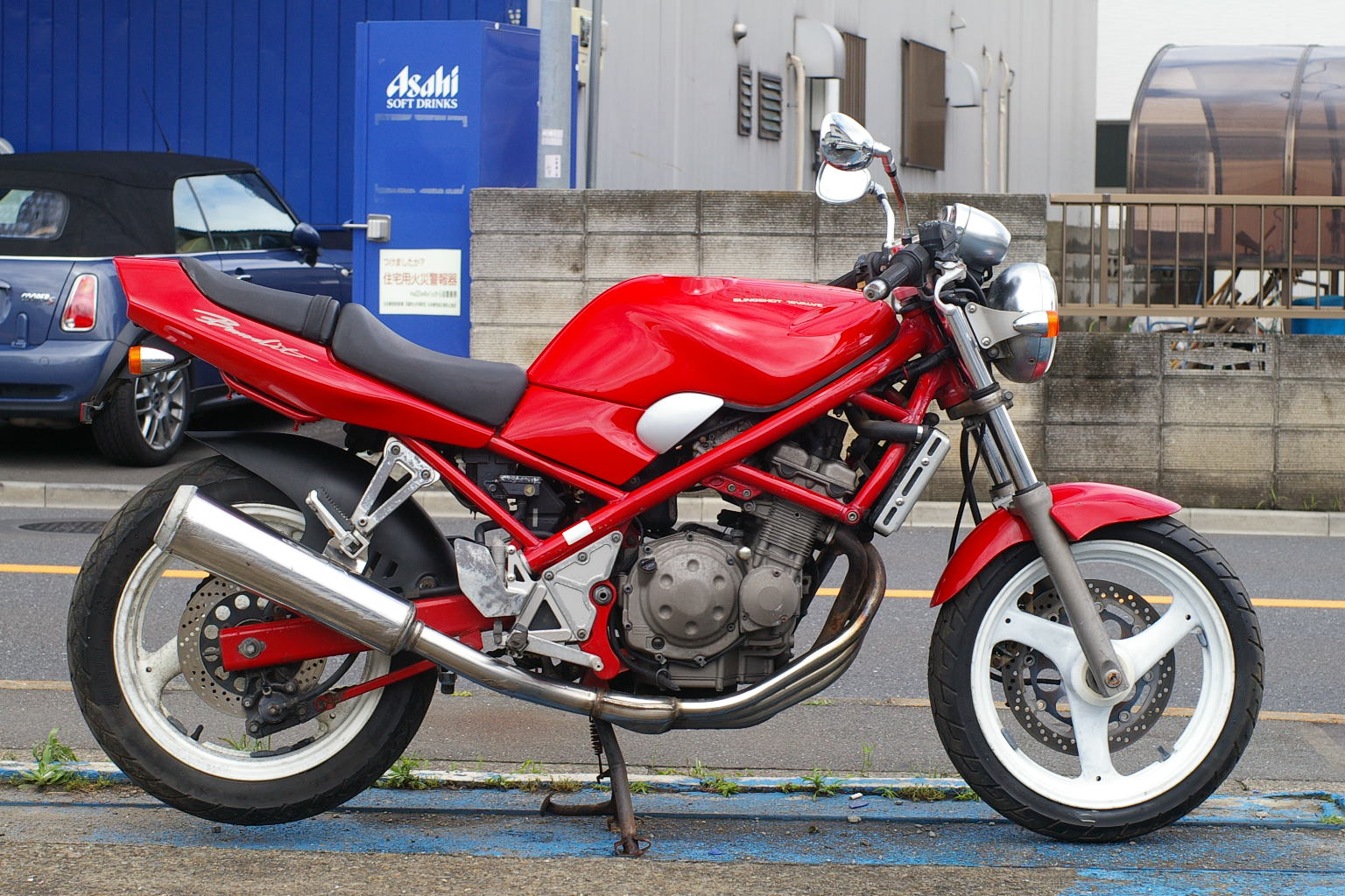 SUZUKI BANDIT 250